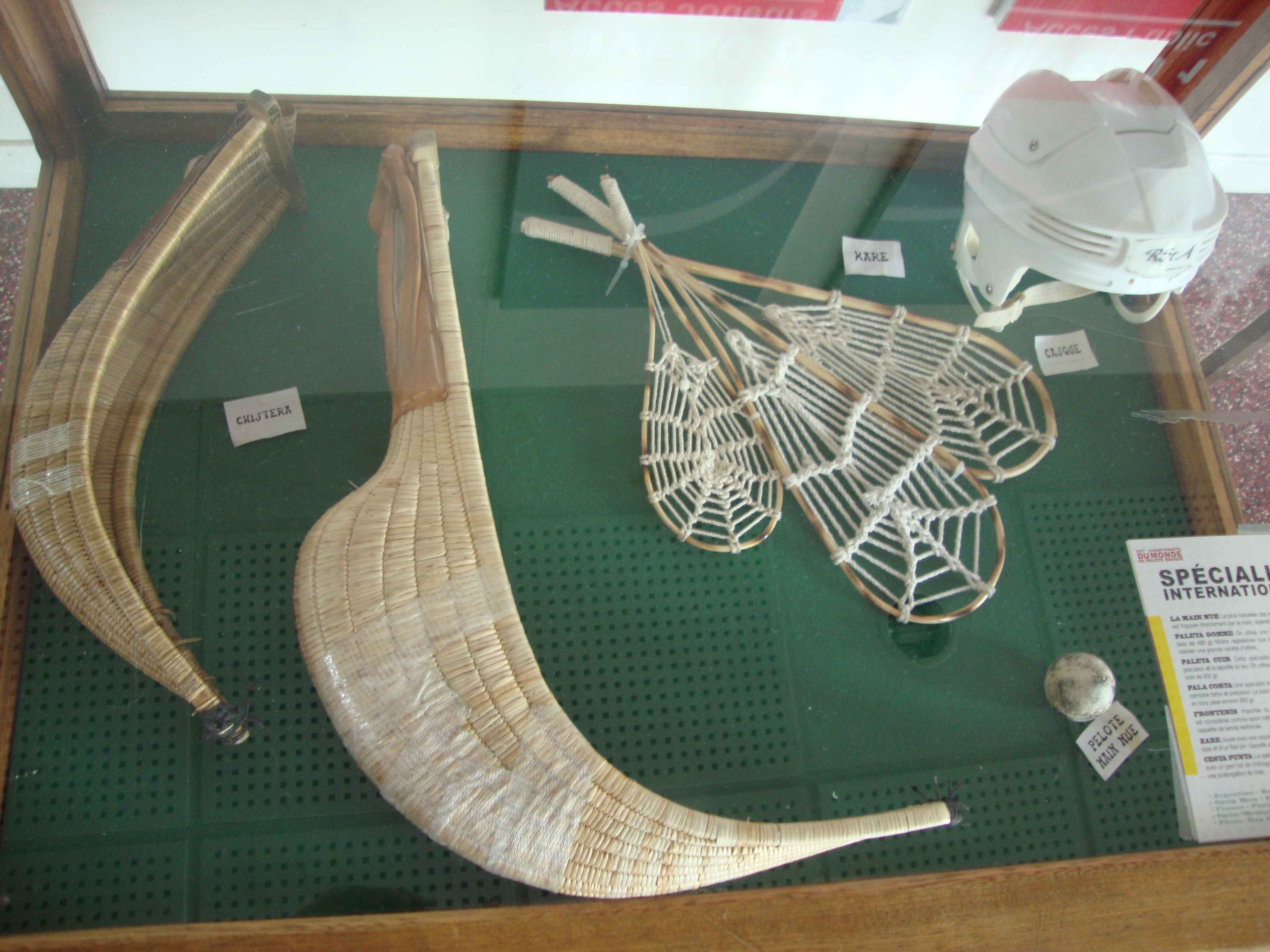 Complexe de pelote basque de Pau, vitrine 1, pelota equipment